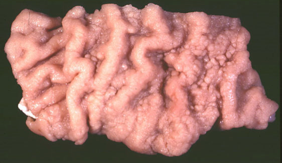 ヨーネ病感染牛のt回腸粘膜